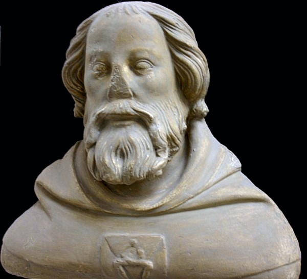 Matyáš z Arrasu. Bysta od Petra Parléře z triforia svatovítské katedrály v Lapidáriu Národního muzea.